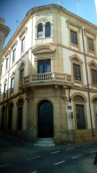 Fotografía del edificio donde se ubicara la primera sede de la Caja de Ahorros de Almería el año 1910.